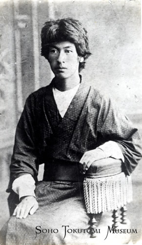 蘇峰徳富猪一郎：明治19年夏（24歳）